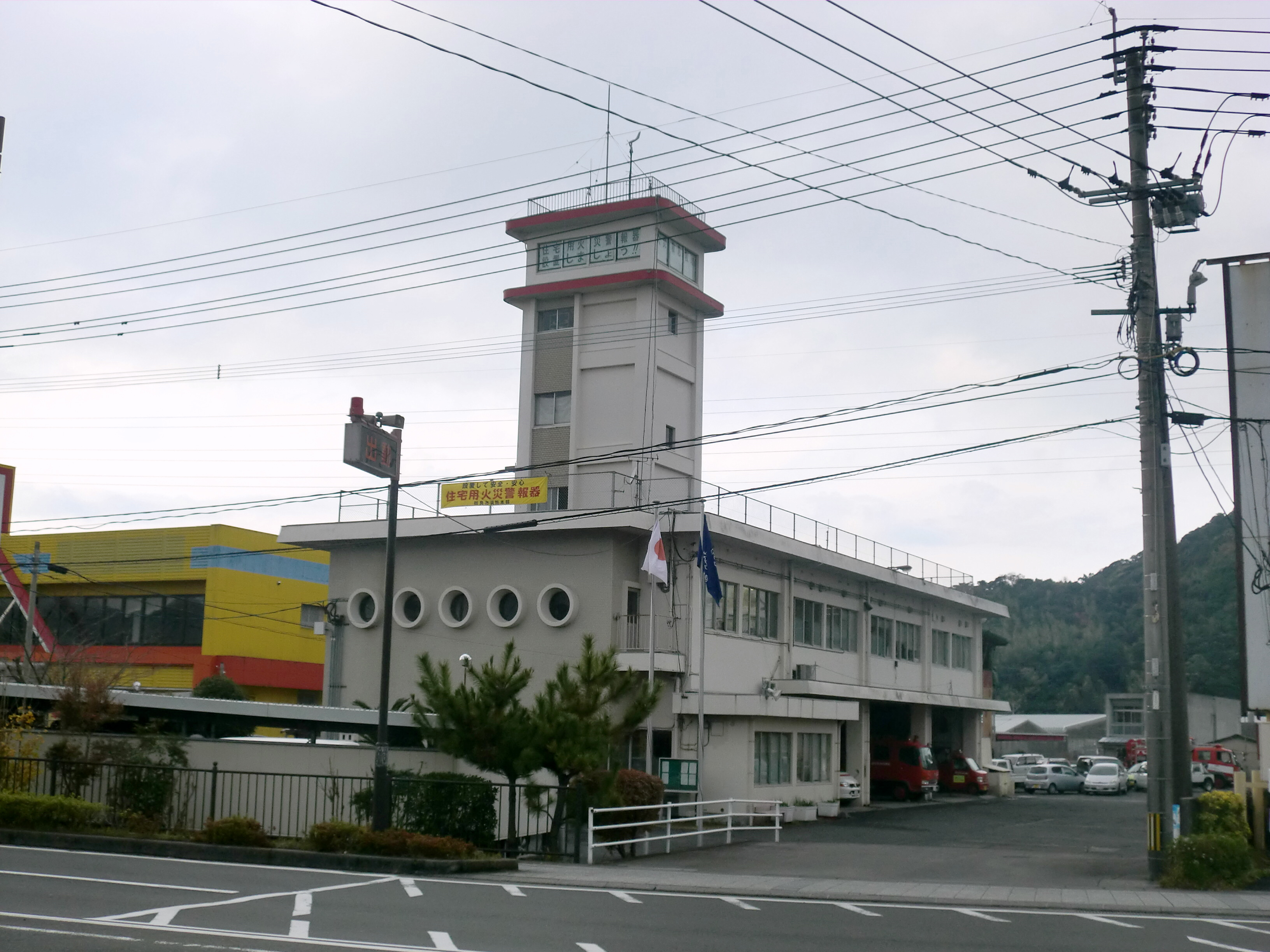 姶良市にある姶良市消防本部